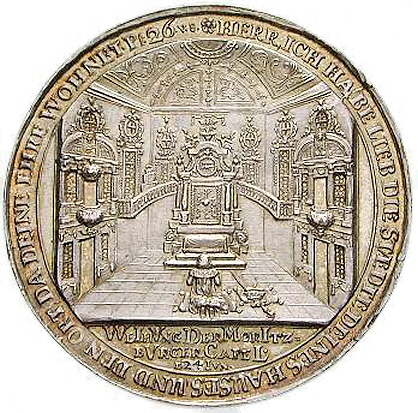 Motiv: Einweihung der Kapelle durch Kurfürst Johann Georg II. von Sachsen